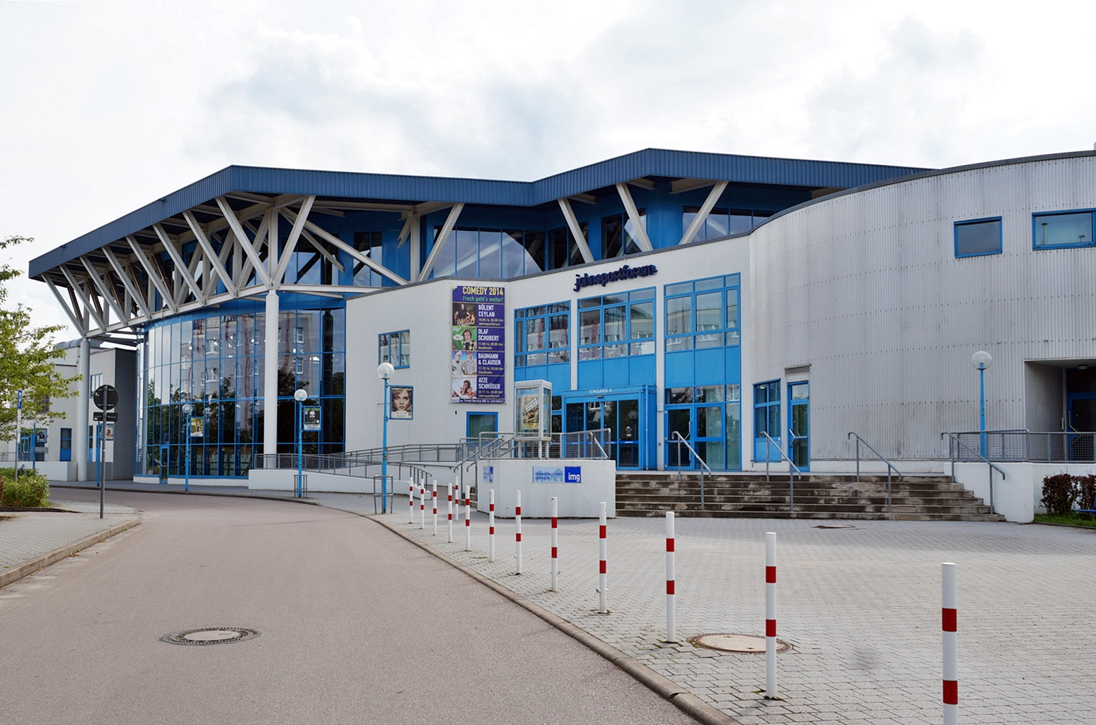 Jahnsportforum Neubrandenburg, 09.08.2014